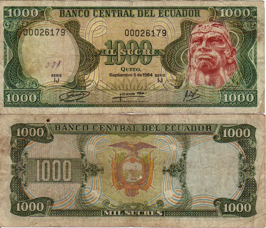 Ecuadorian 1000 Sucres bill